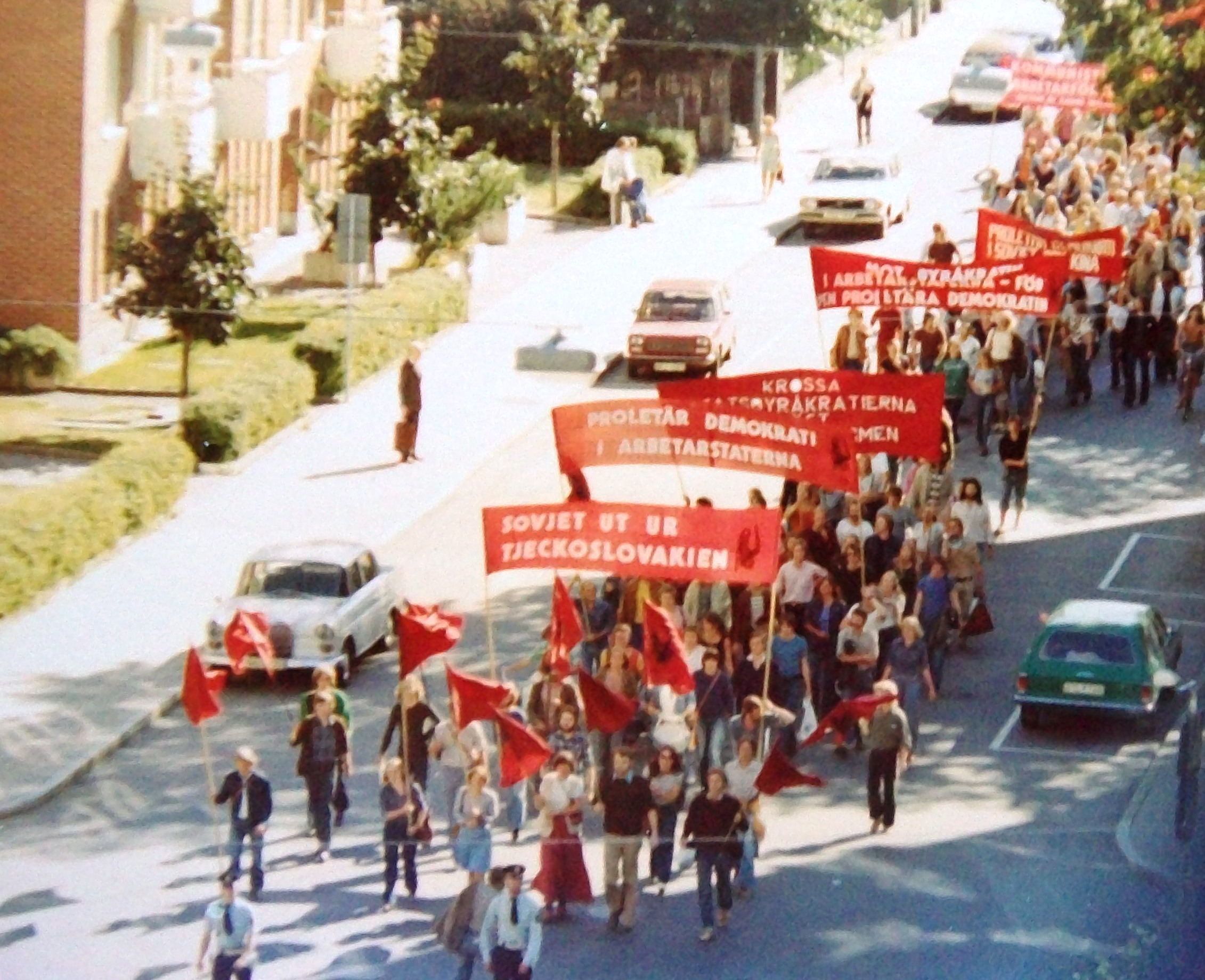 Fotografia bola odfotená z okna budovy bývalej československej ambasády v Štokholme 21. 8. 1974, protest proti sovietskej okupácii Československa